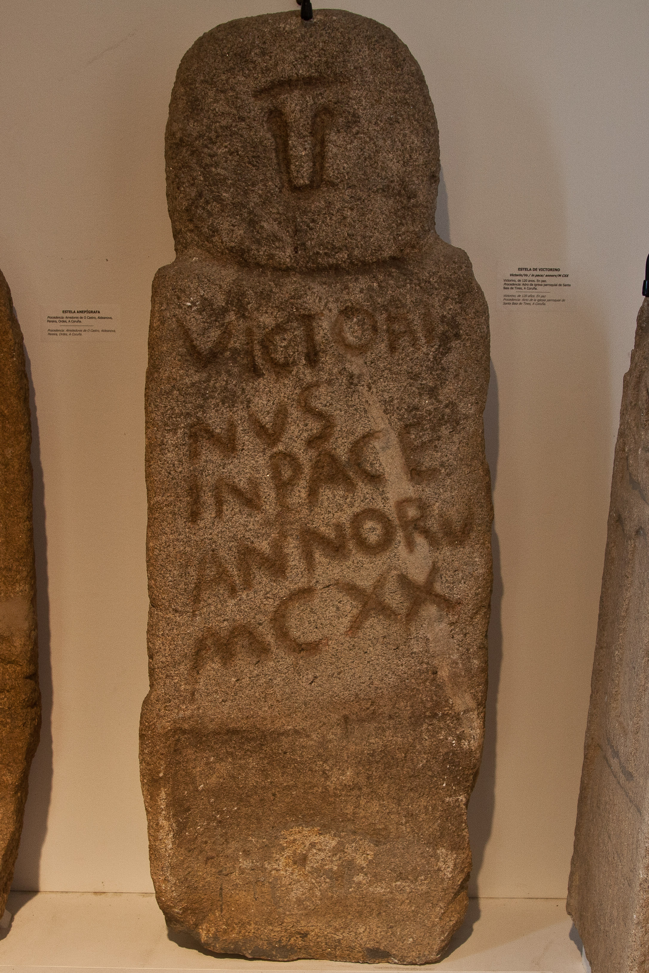 Victorin/Vs / in pace/ annorv/ M CXX Victorino, de 120 anos. En paz. Procedencia: Adro da igrexa parroquial de Santa Baia de Tines, A Coruña. A estela antropomorfa de Victorinus (nº3), presenta a fórmula funeraria "in pace", que revela xa unha crenza cristiá. Séculos III-finais do IV d.C.